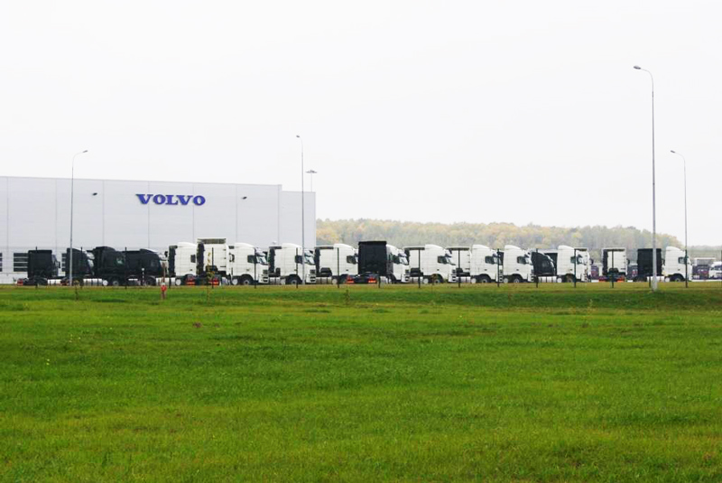 ЗАО «Вольво Восток»